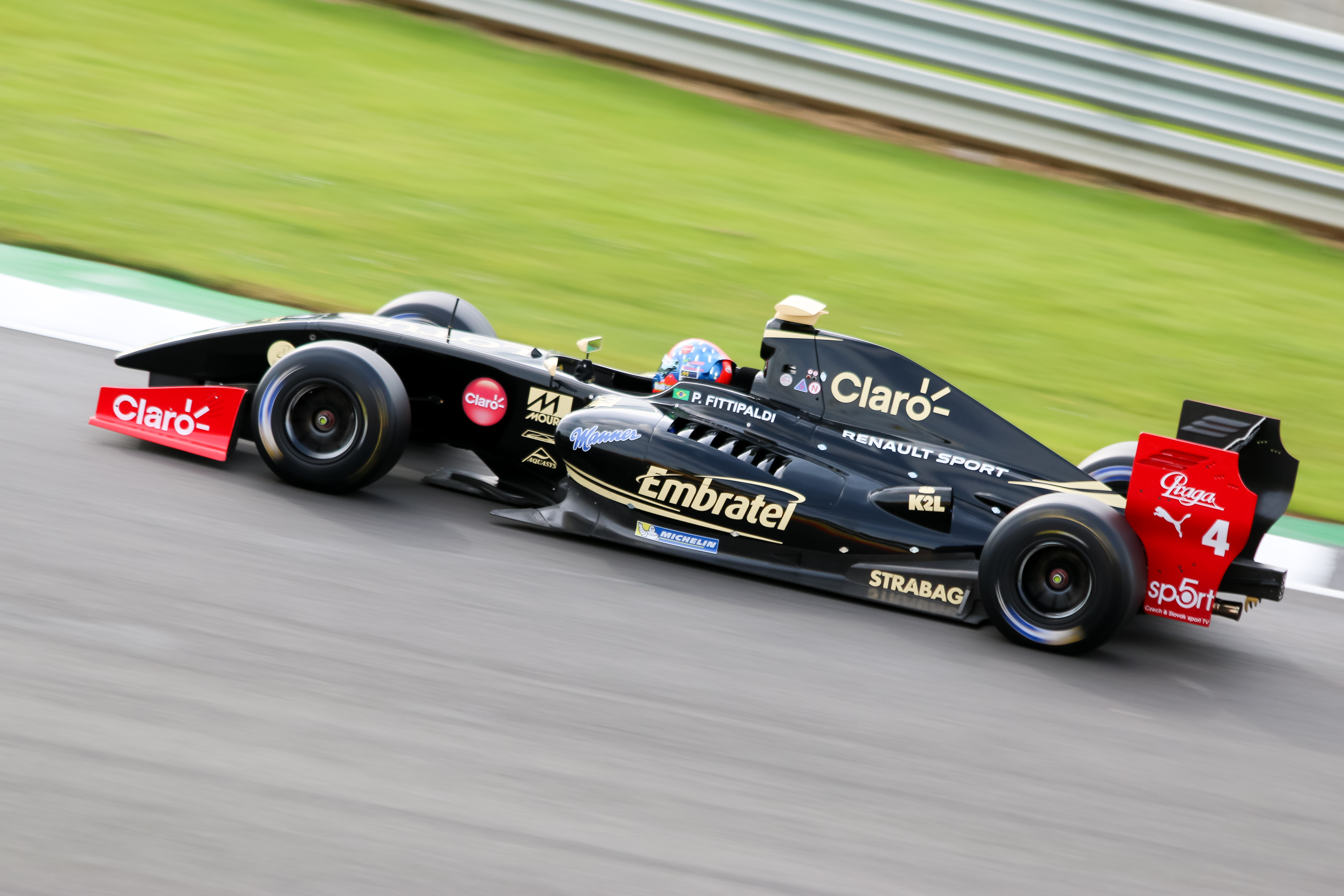 2017 World Series Formula V8 3.5, Silverstone Circuit.